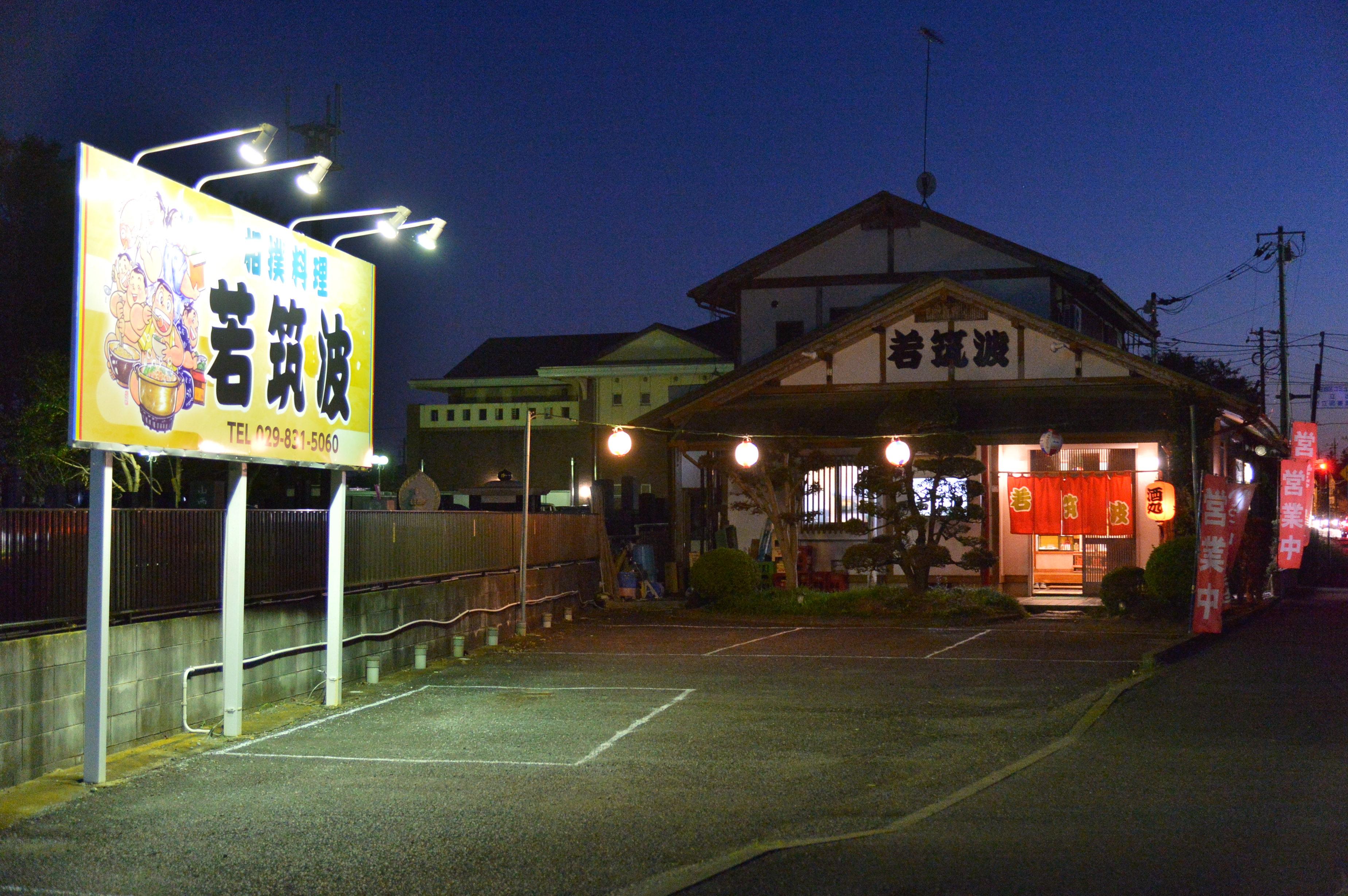 相撲料理 若筑波 神立店。茨城県土浦市神立町663番。